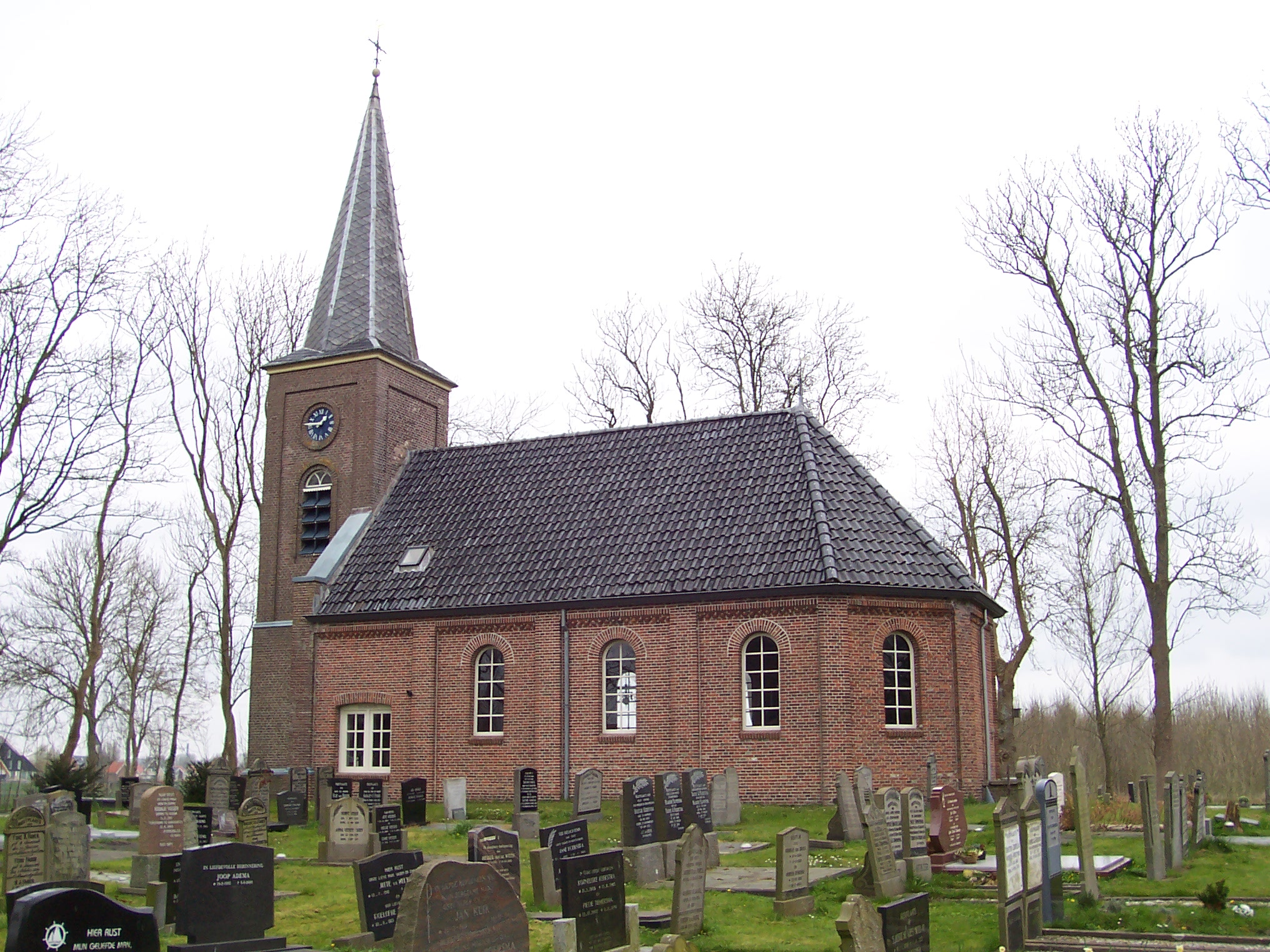 Himpens, tsjerke